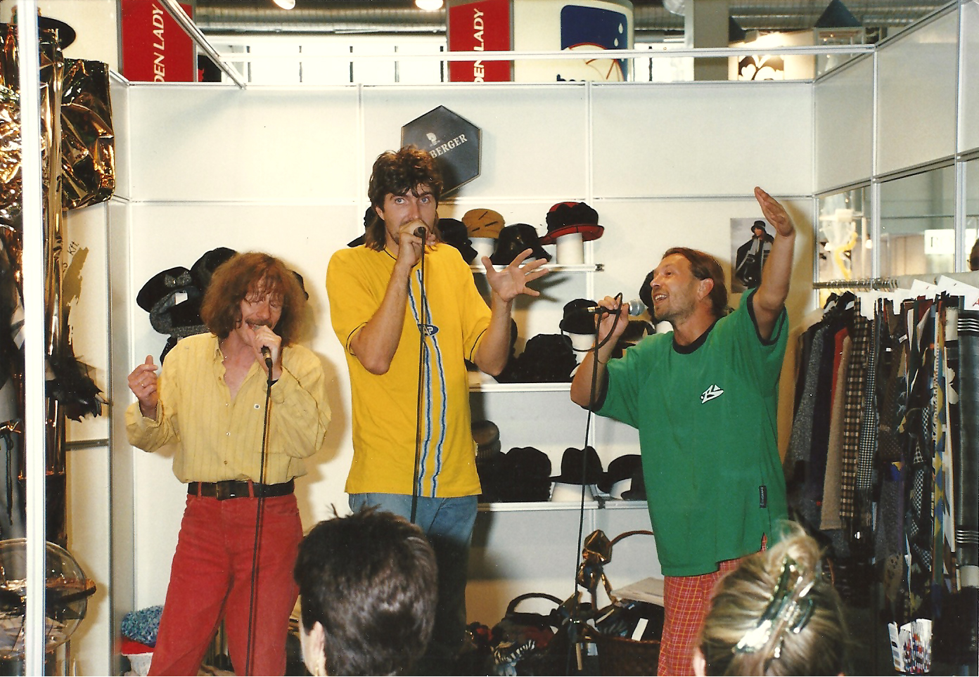 MyCream együttes (Walla Ervin, Wéber Tamás, Orbán Sándor)